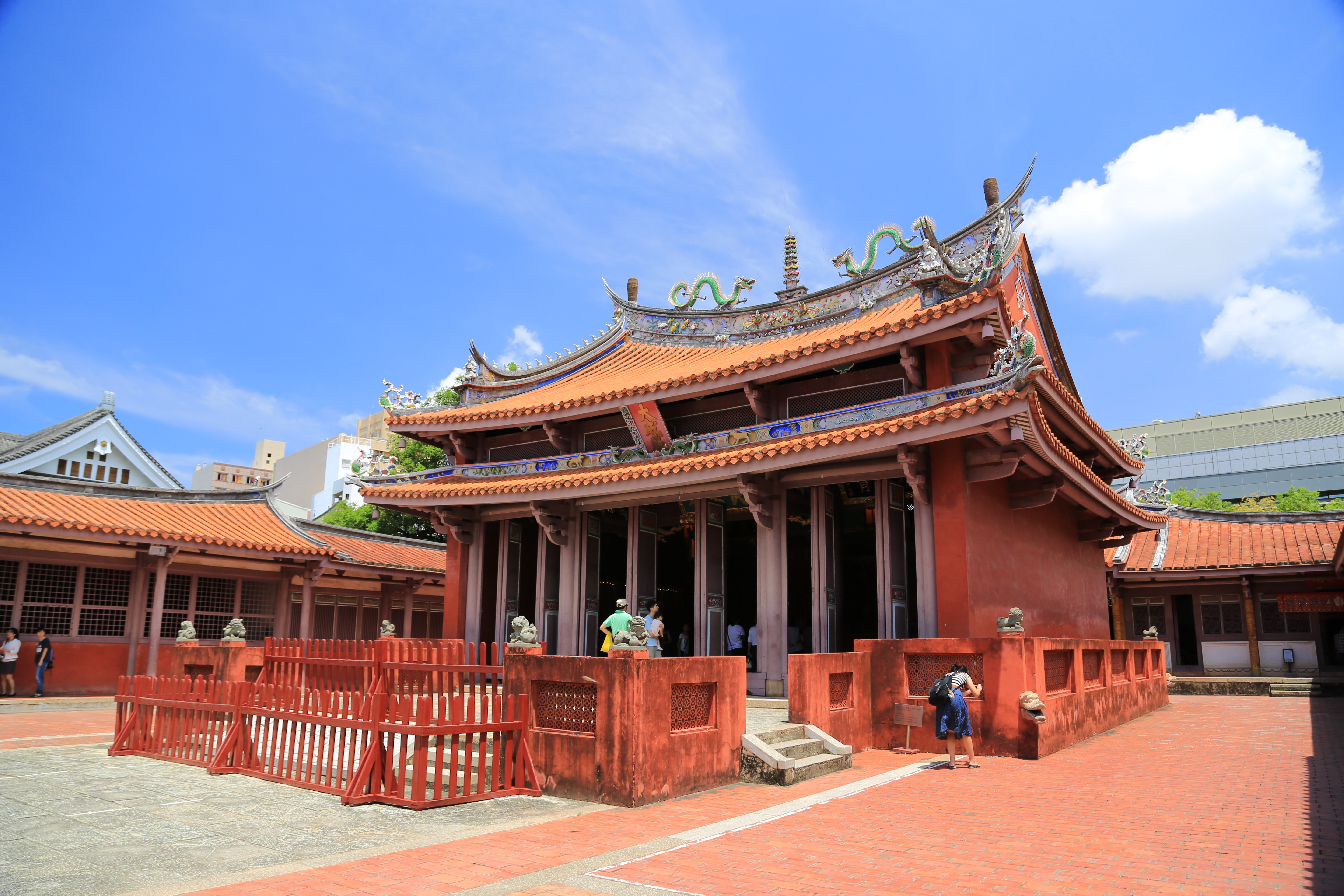 台南市孔廟大成殿左側